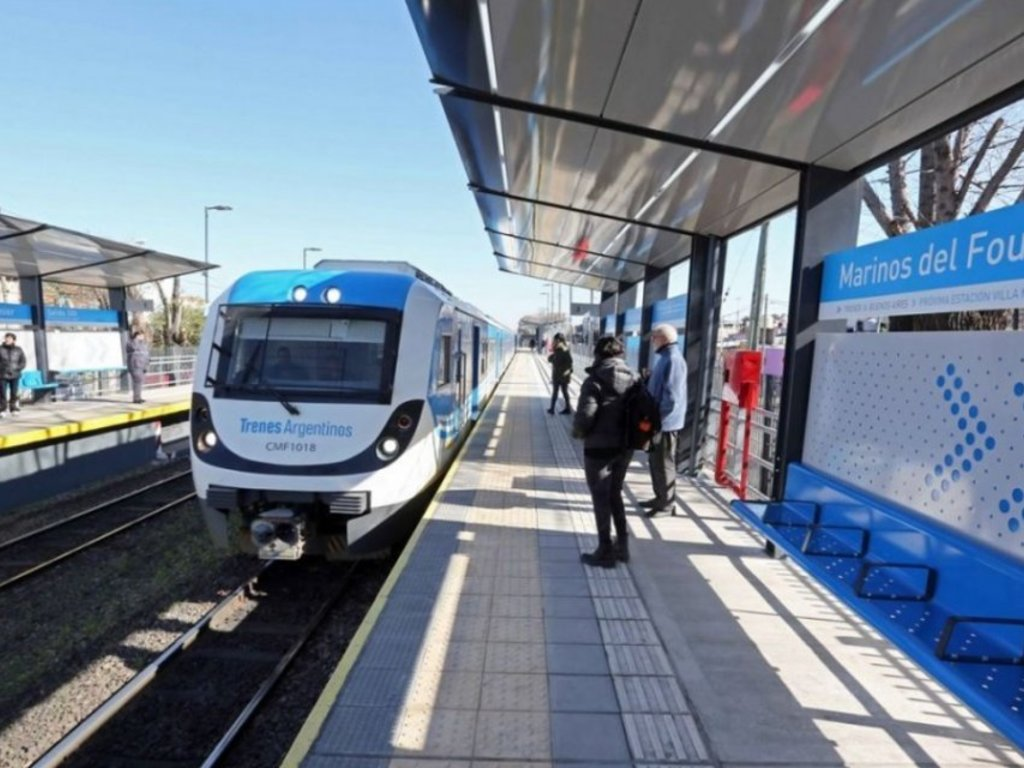 Nueva estación en Villa Madero